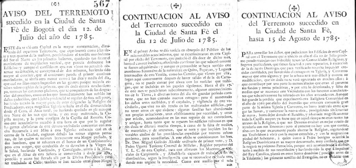 Paginas Principales del Aviso del terremoto sucedido en la ciudad de Santa Fe de Bogota en 1785